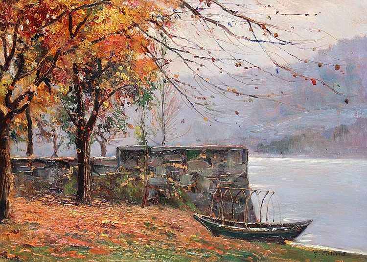 Paesaggio in riva al lago, olio su tavola, 27 x 36,5 cm, coll. privata